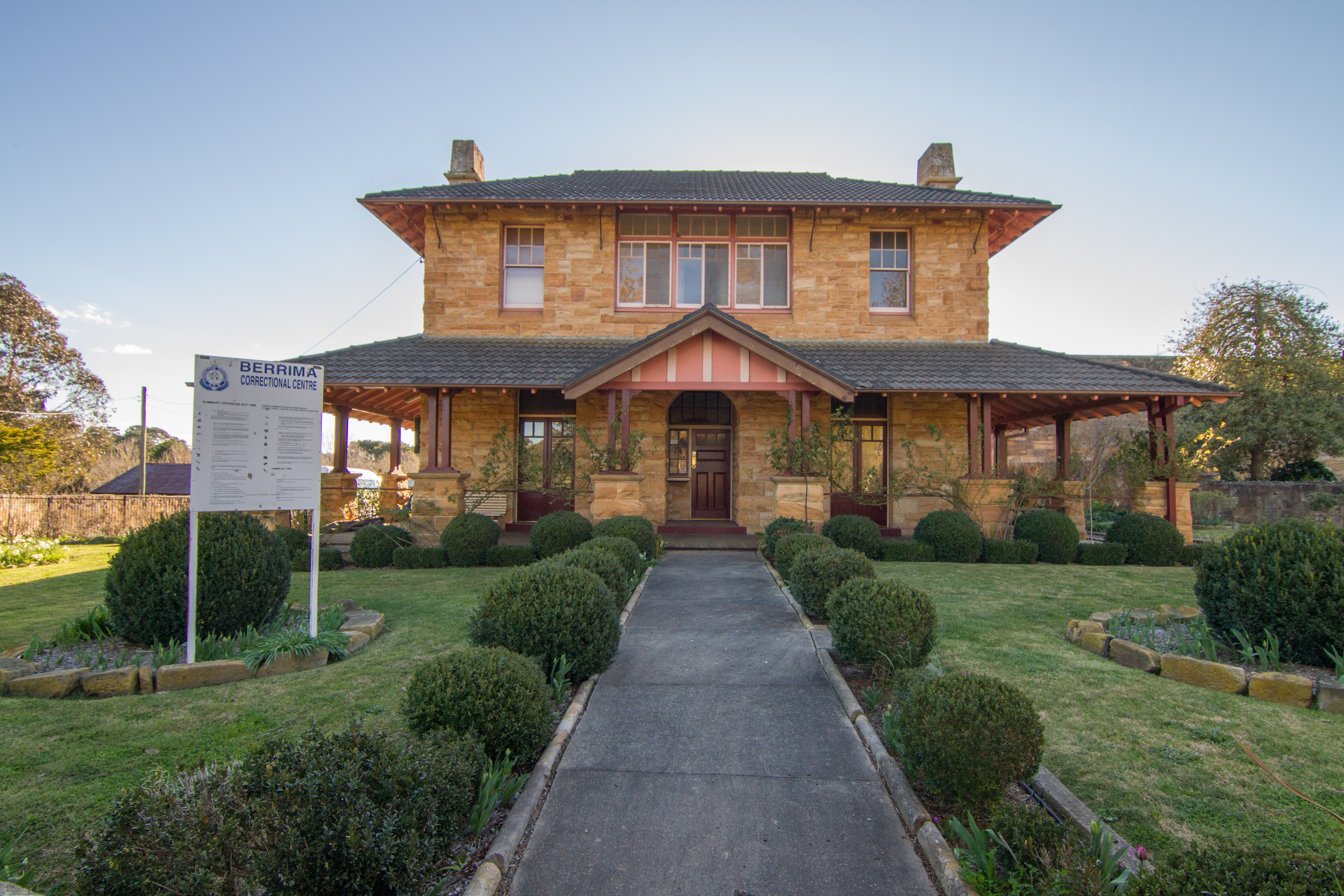 Berrima NSW 2577, Australia